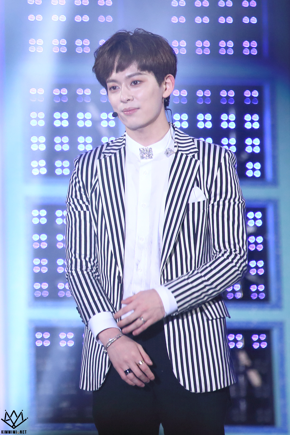 150516 보이프렌드 양산웅상회야제